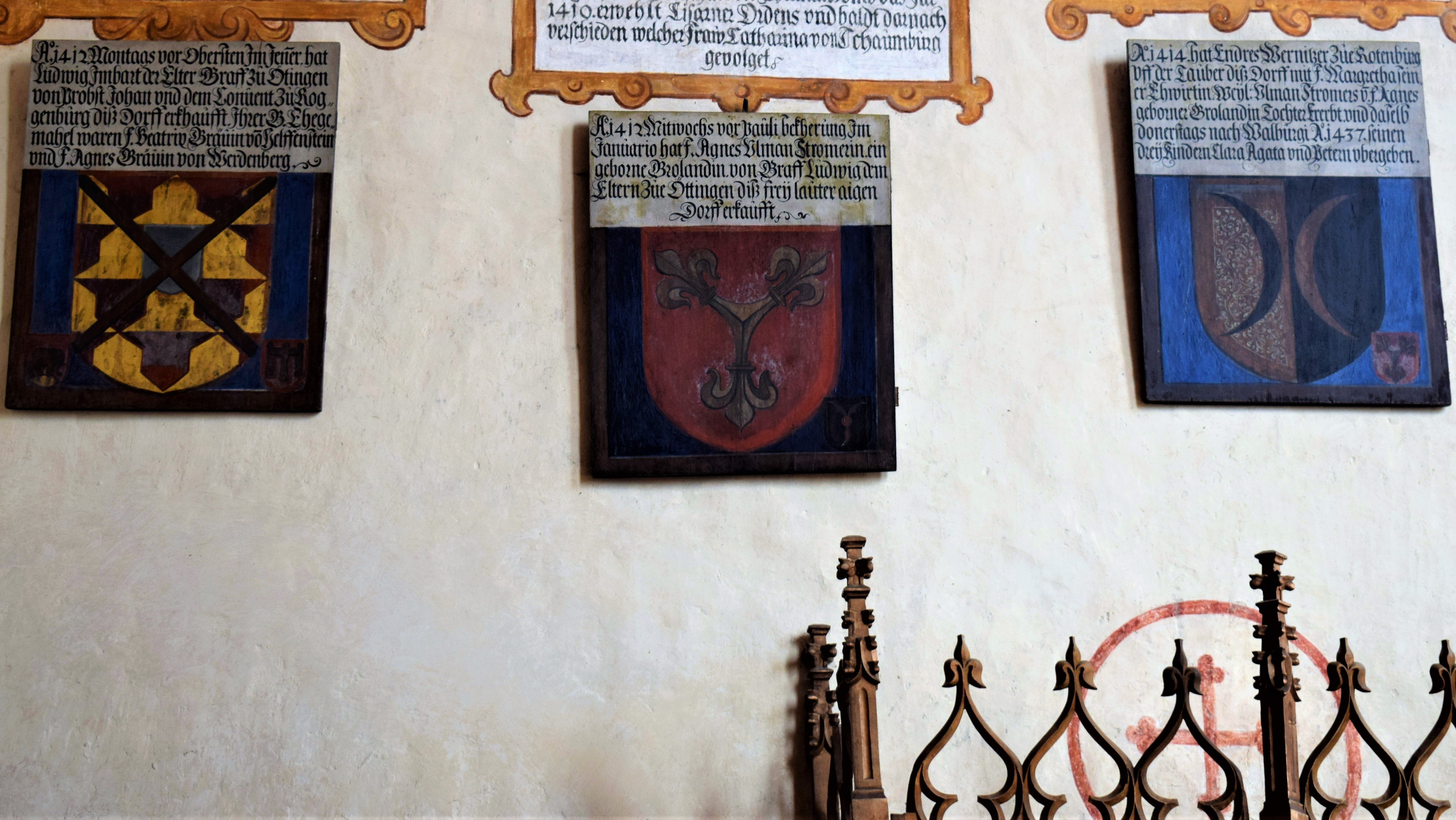 Rieterkirche Kalbensteinberg, Historien-Schilder mit den Wappen der Grafen von Oettingen, Stromer und Wernitzer (1609/13) an der Nordwand des Chores